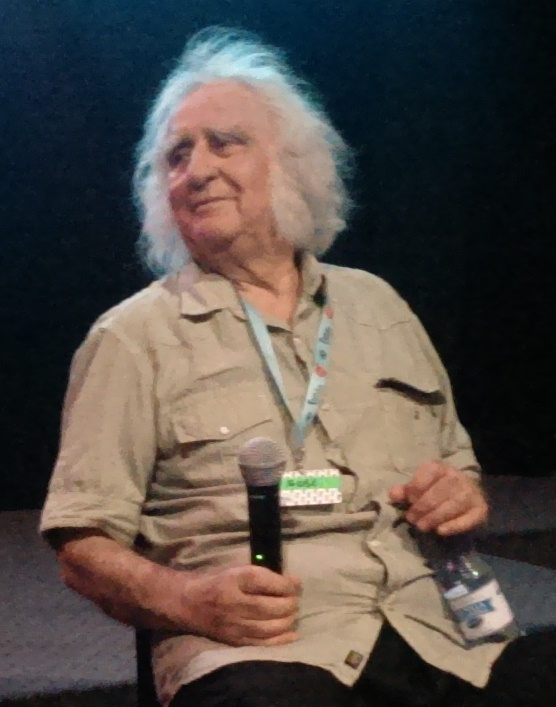 Wywiad ze Stanisławem Jędryką przed projekcją filmu "Podróż za jeden uśmiech" w trakcie festiwalu "Kino w trampkach".